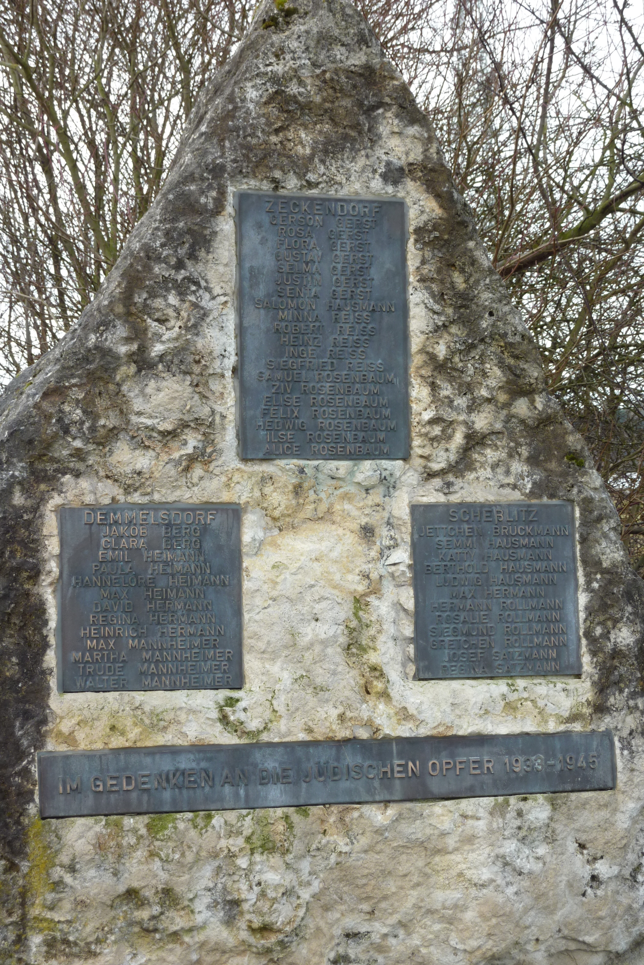 Demmelsdorf, Gedenkstein an die jüdischen Gemeinden von Zeckendorf, Scheßlitz und Demmelsdorf